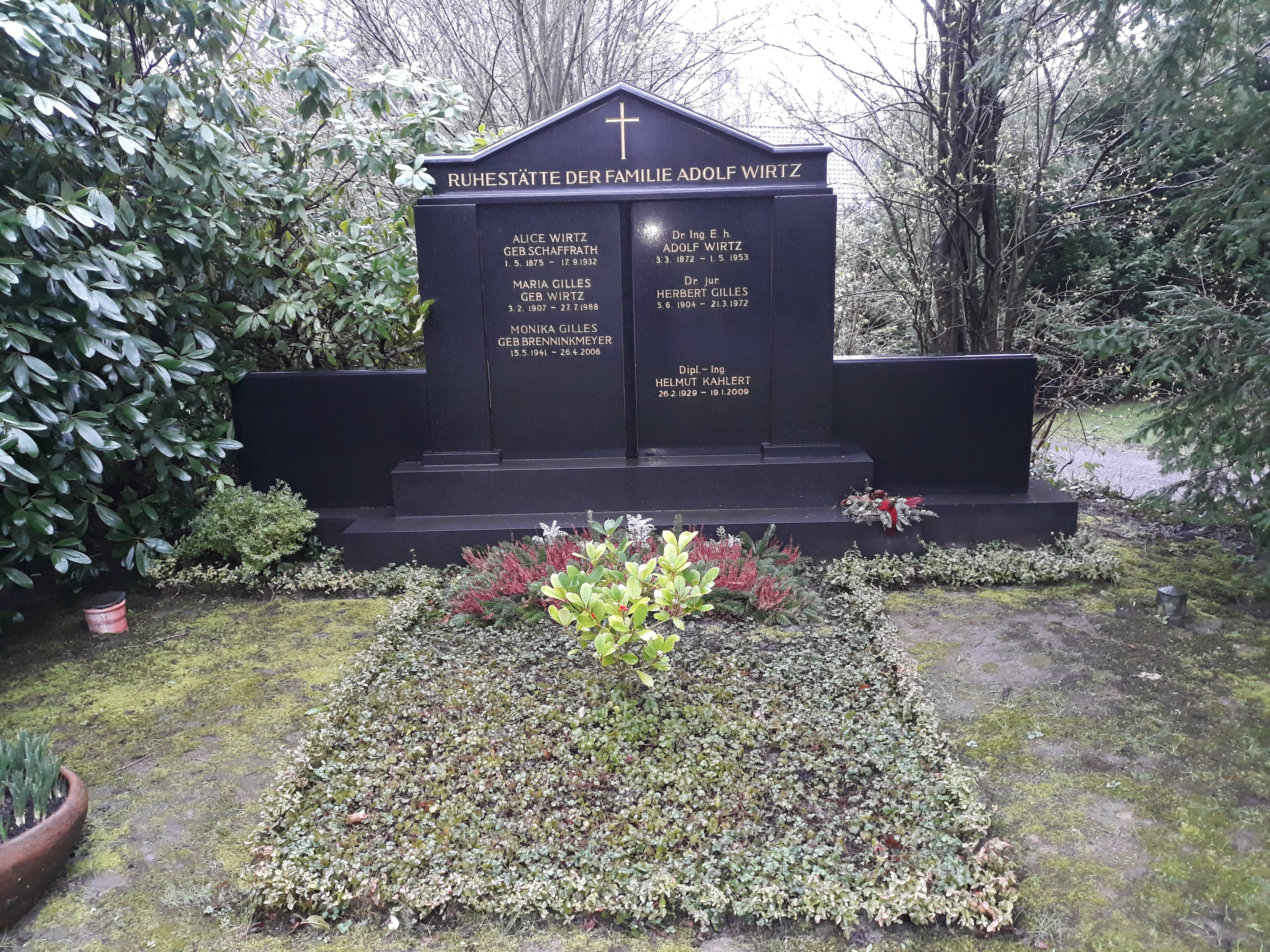 Das Grab des deutschen Industriellen Adolf Wirtz im Familiengrab auf dem Hauptfriedhof Mülheim an der Ruhr.